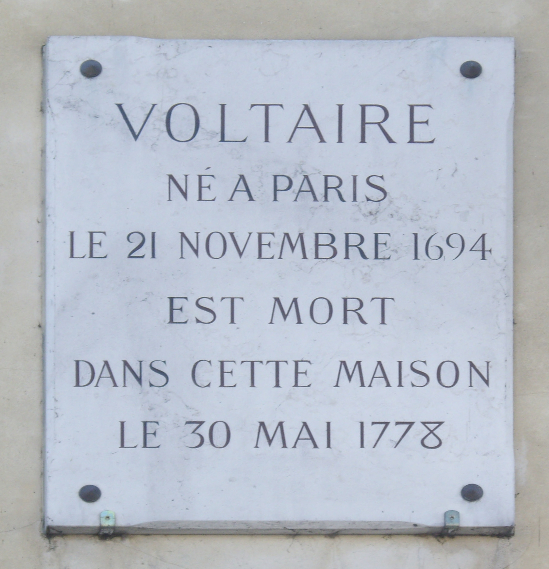 Plaque apposée au n° 27 du quai Voltaire, Paris 7e, où Voltaire mourut le 30 mai 1778.